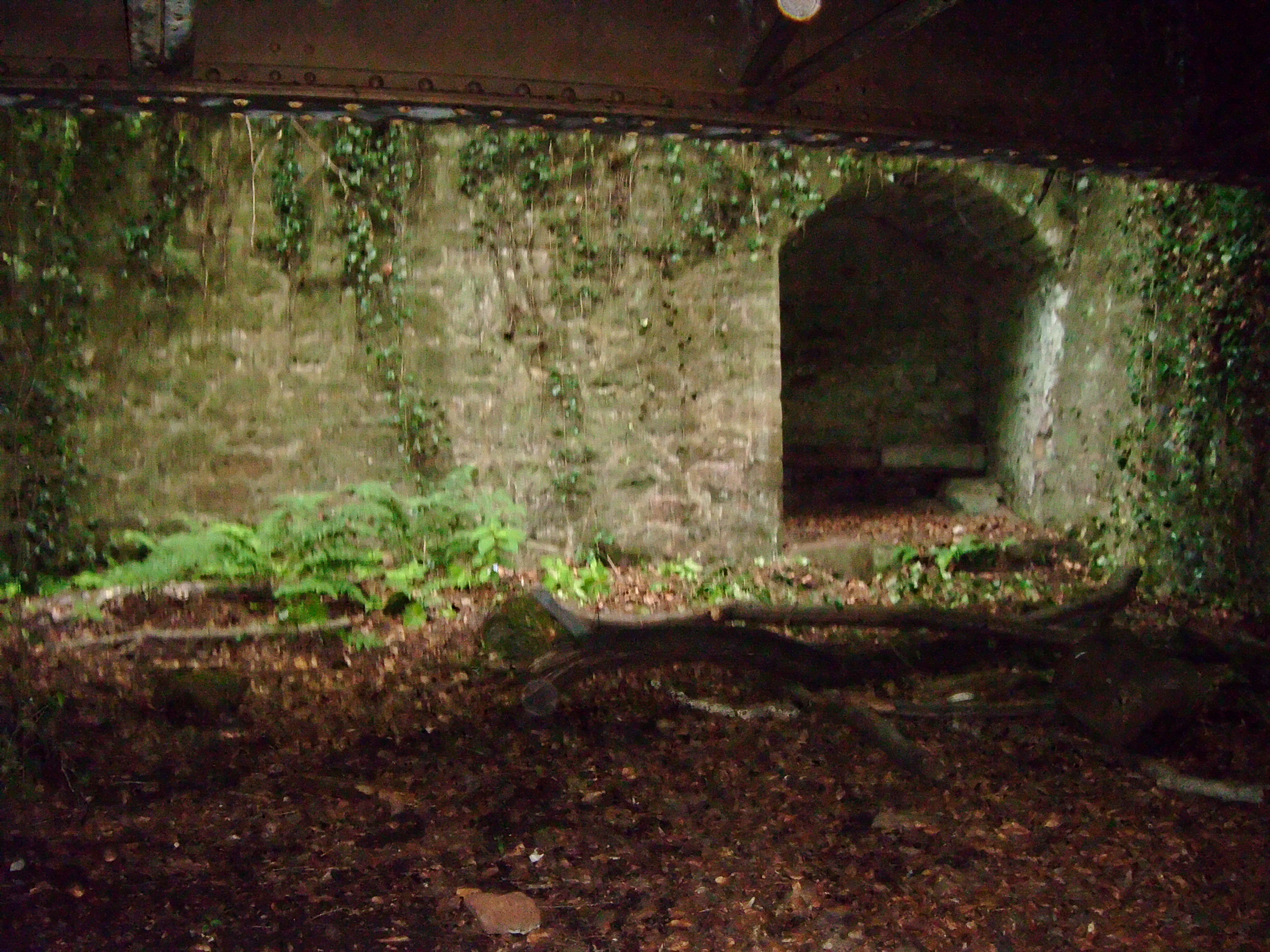 Neuleiningen-Tal, Rheinland-Pfalz, Historischer Waschplatz